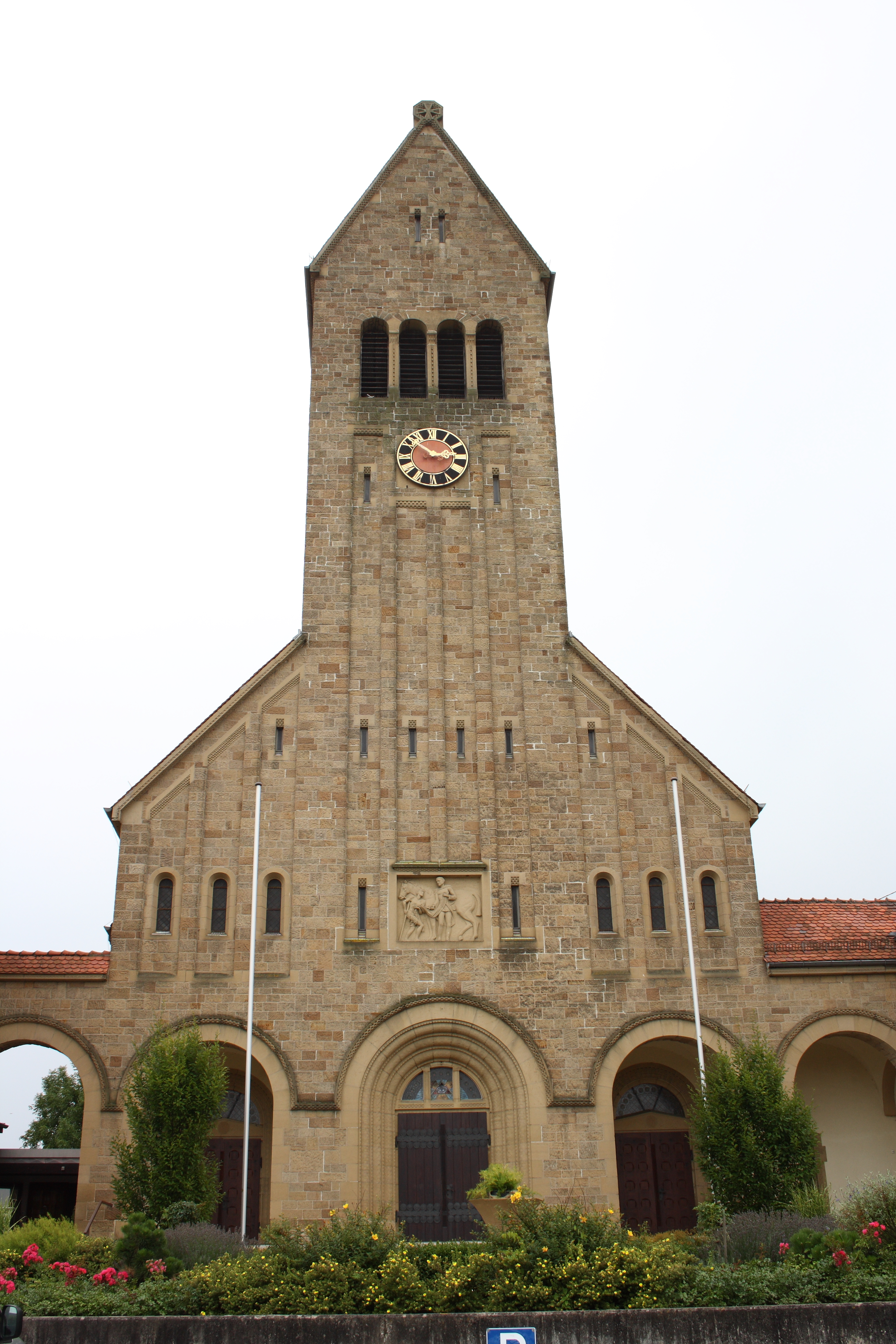 katholische Kirche St. Martin in Flehingen, Bahnhofstraße